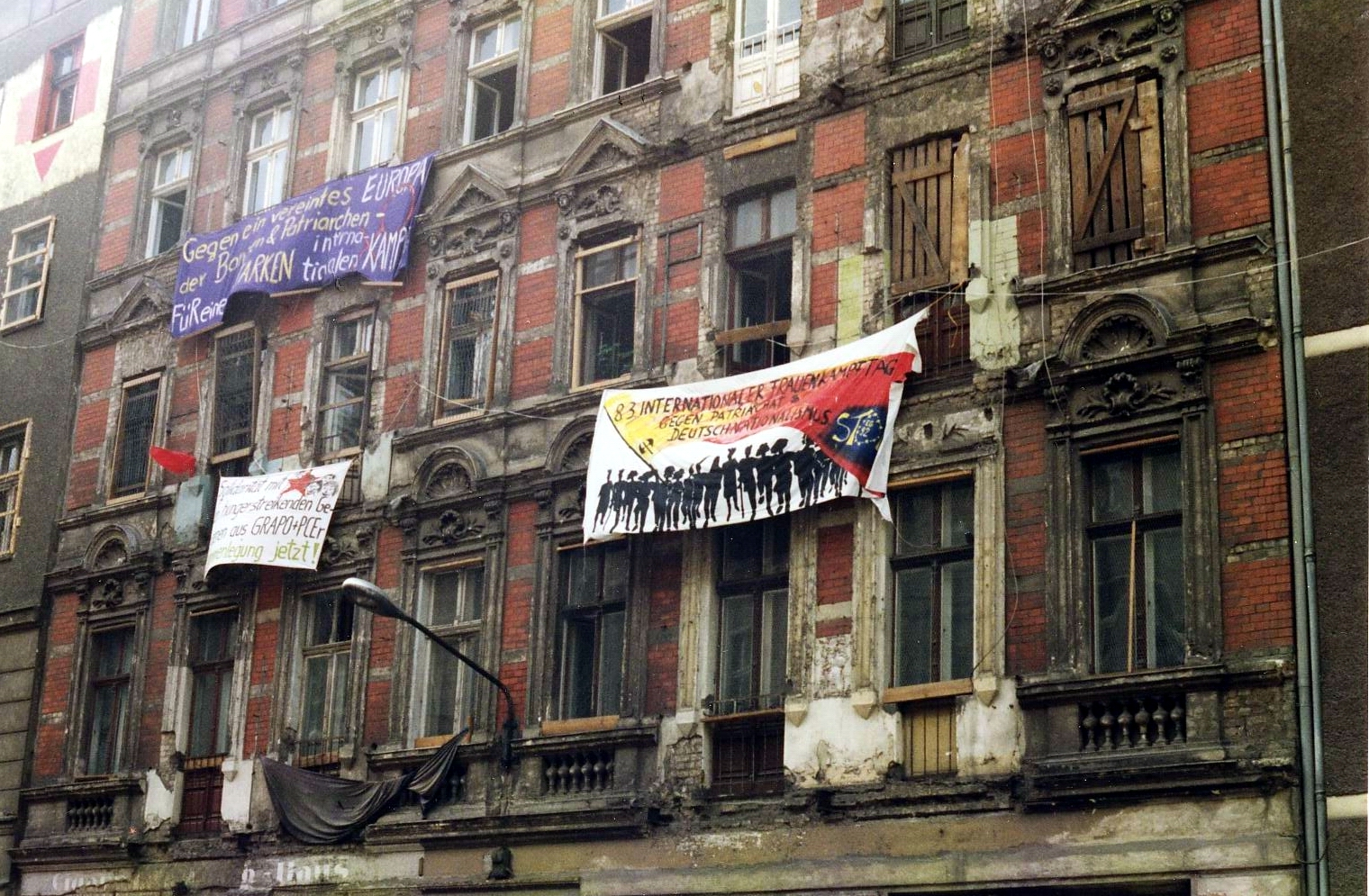 Ost-Berlin, Besetzte Häuser, Mainzer Straße, das Foto habe ich im Juni 1990 gemacht